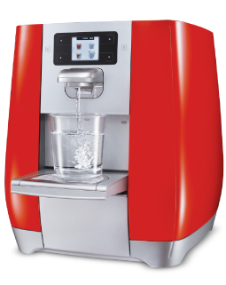 מכשיר של תמי 4